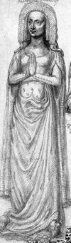 Margaret de Brabant